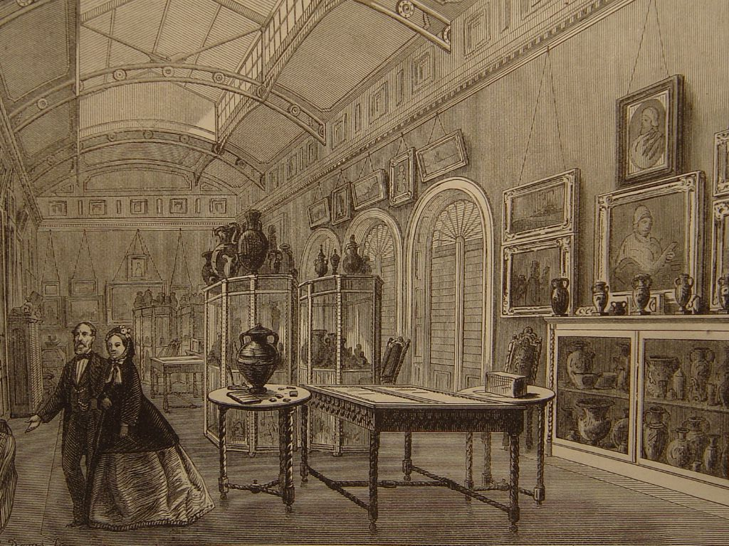 Galerie Artistique (intérieur du chateau de De Meester de Ravestein à Hever près de Malines